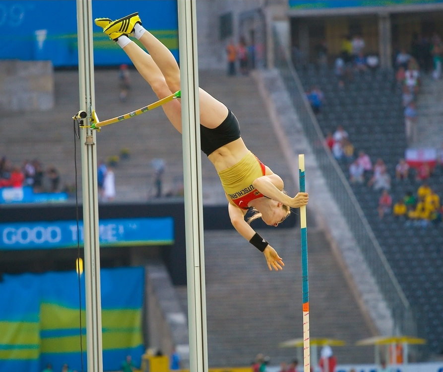 Silke Spiegelburg beim Stabhochsprung.